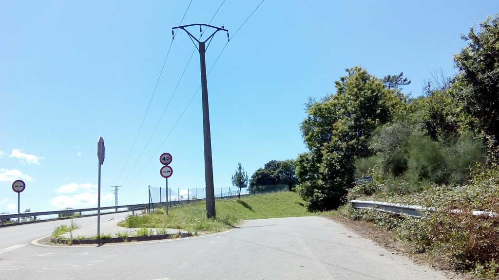 Acceso a Maques de Arriba, Curtis.